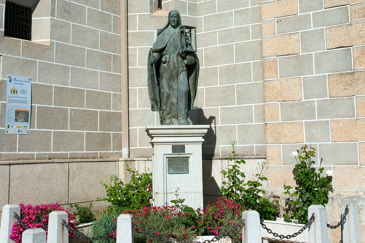 Beata Francisca de Oviedo. Serradilla